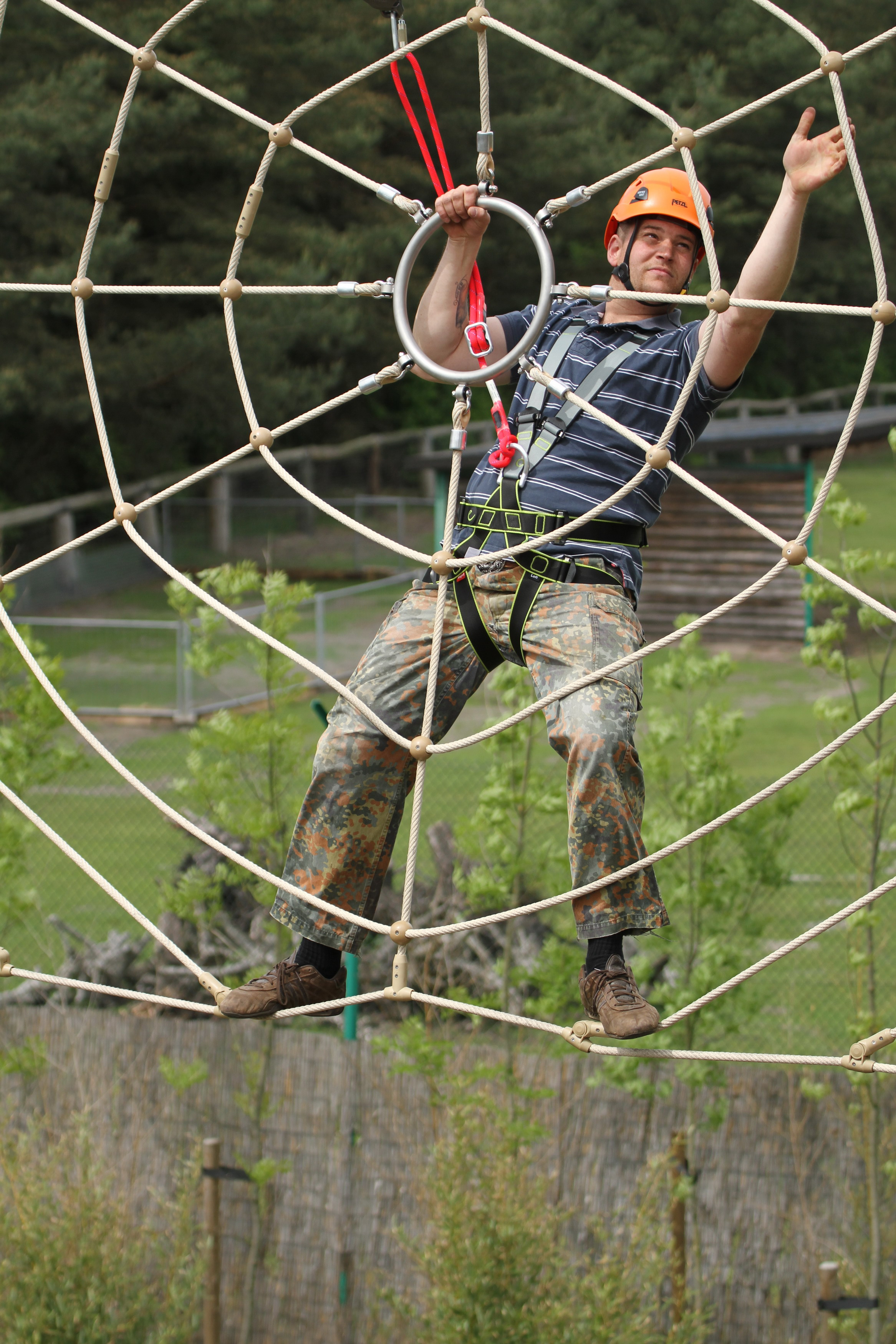 Hochseilgarten im Safaripark